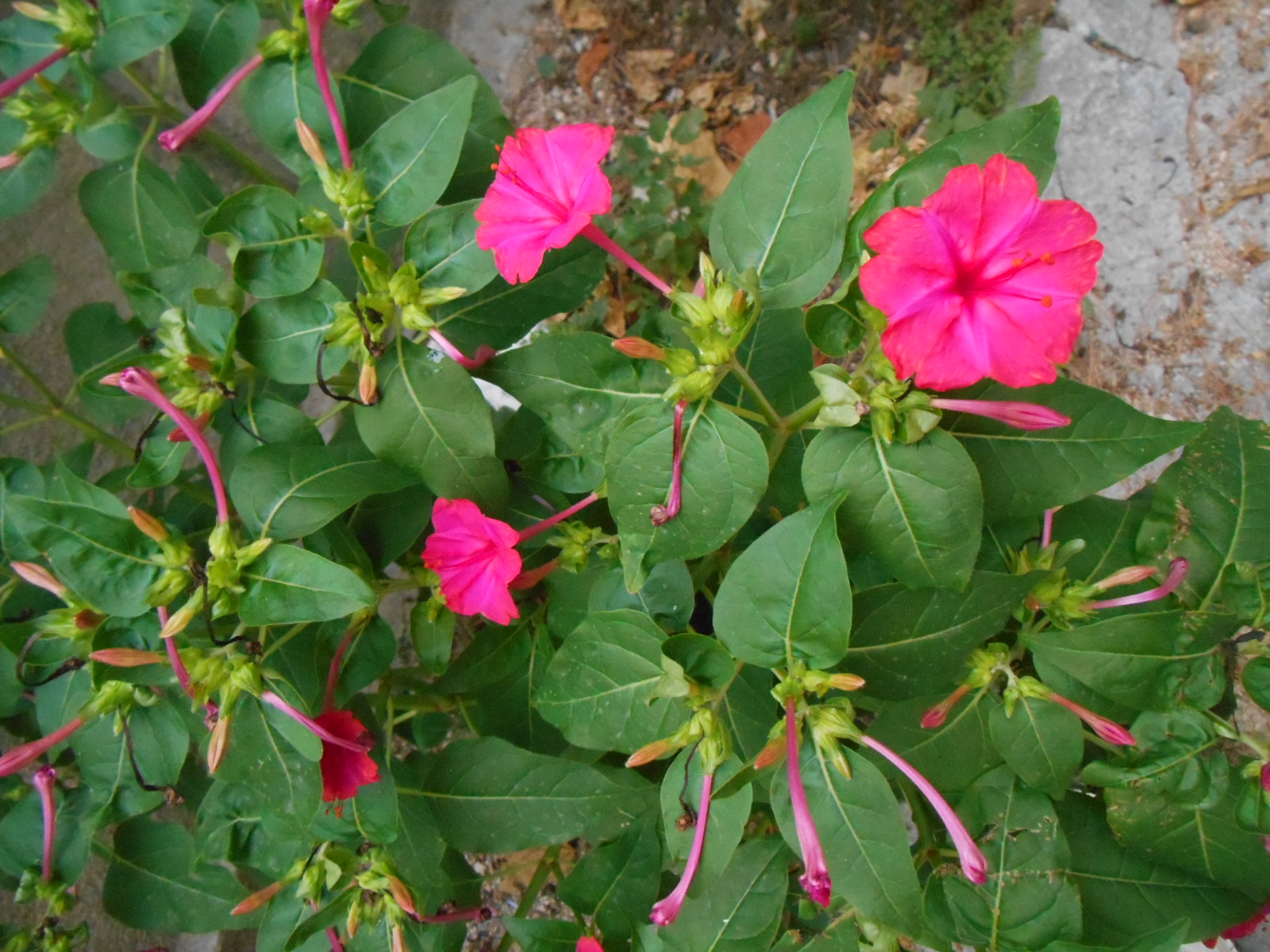 Belle de nuit aux Riaux